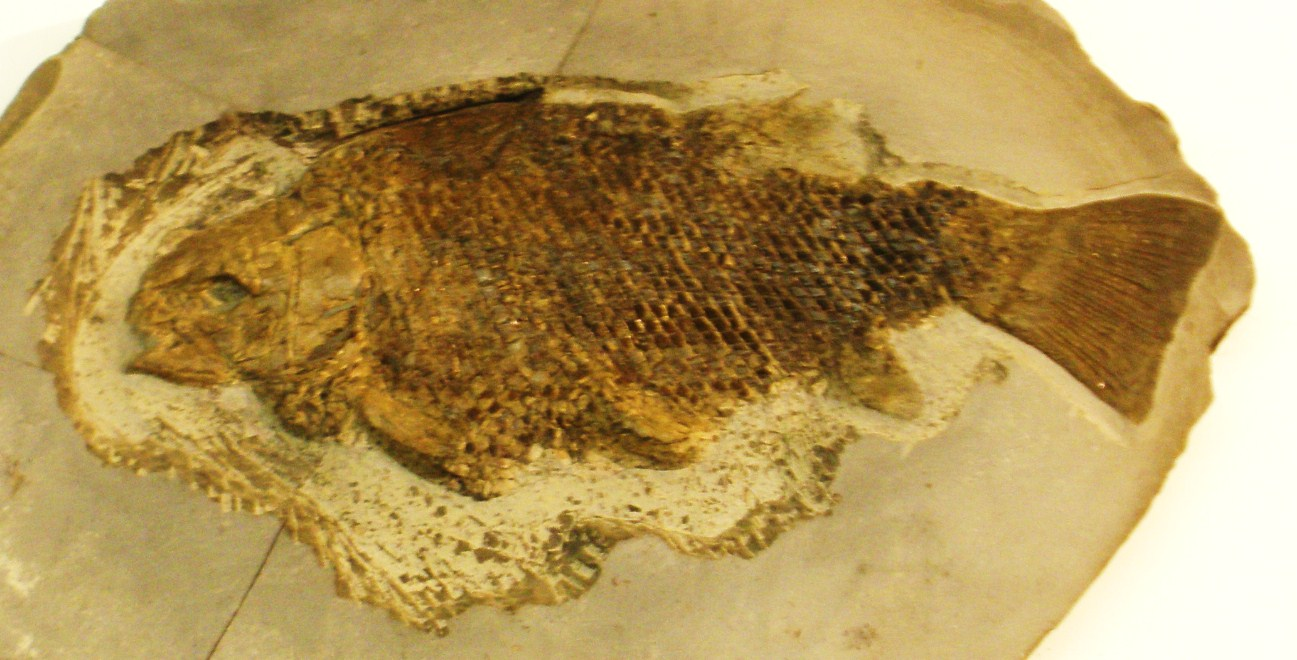 Fossil of Paralepidotus ornatus (formerly Lepidotes), an extinct fish